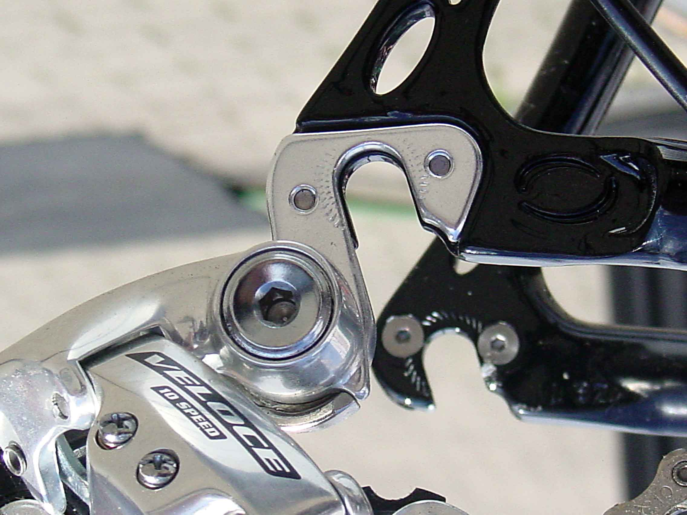 Ausfallende-orbea